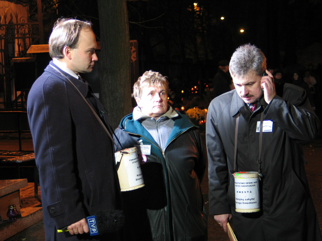 Kwesta na Starym Cmentarzu w Łodzi. (od lewej) Tomasz Lasota, Łucja Robak i Cezary Pawlak